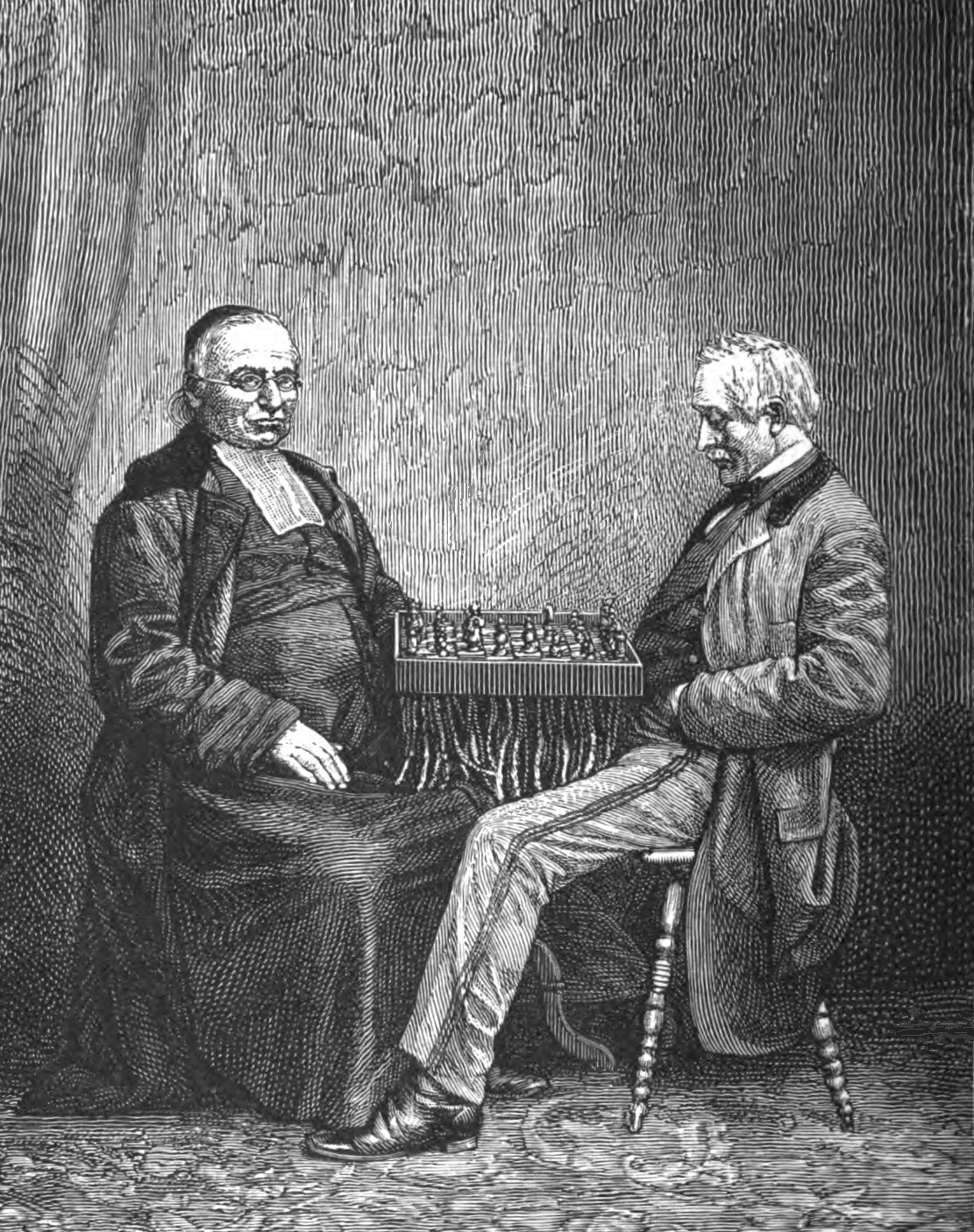 L'abbé Phillipe Ambroise Durand et Jean-Louis Preti, auteurs du livre d'échecs "Stratégie raisonnée des fins de partie ".